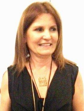 Direttore MAXXI Architettura